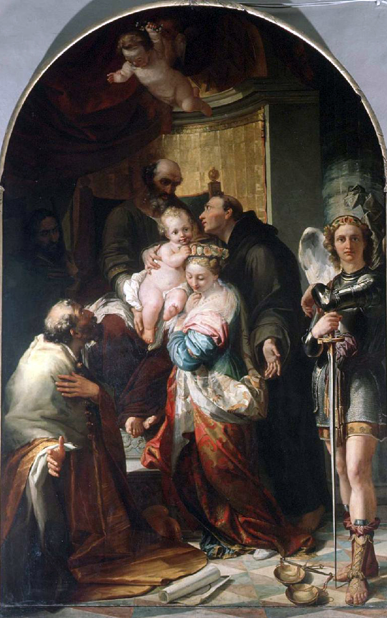 San Giuseppe con Gesù Bambino e Santi, 1828 Soggetto: San Giuseppe con Gesù Bambino tra Sant'Adelaide, Sant'Antonio da Padova, San Lupo e San Michele arcangelo